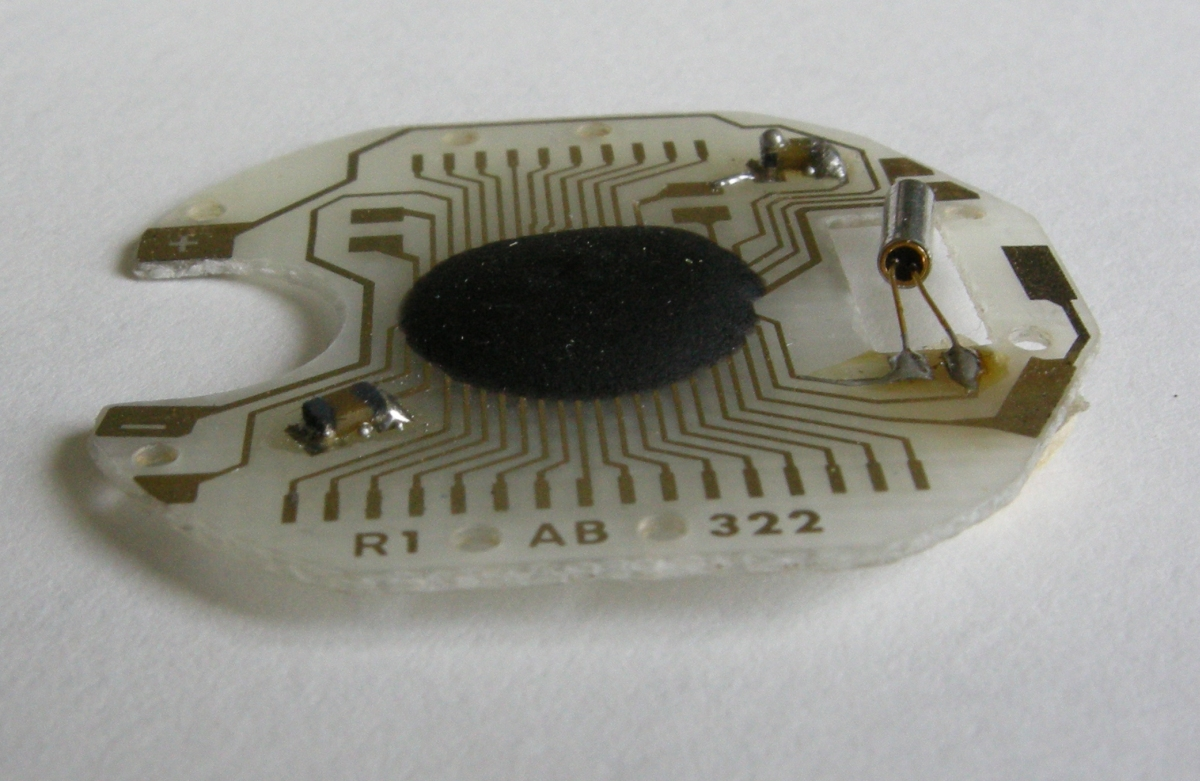 Printplaatje van een LCD-horloge